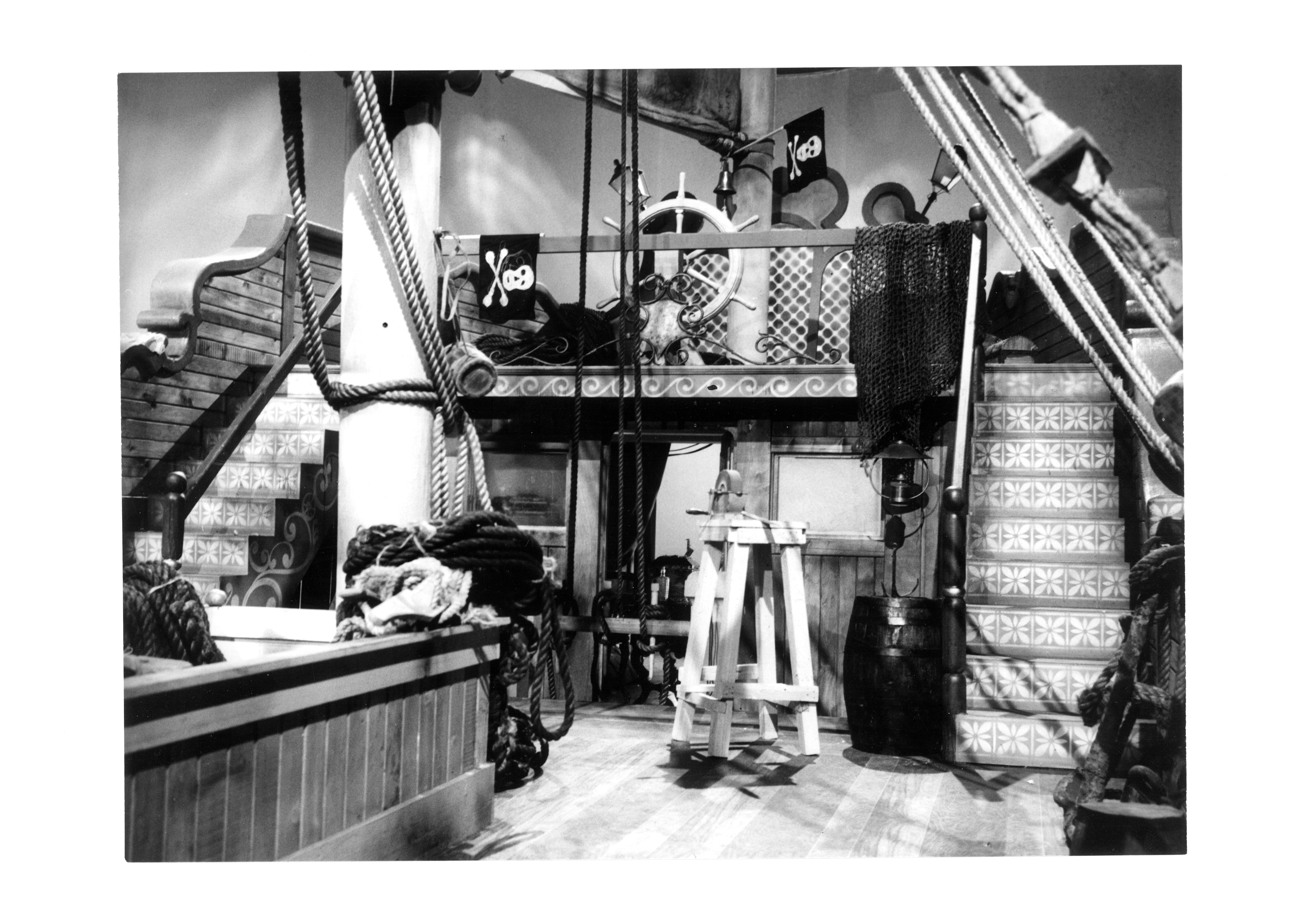 Il set del galeone